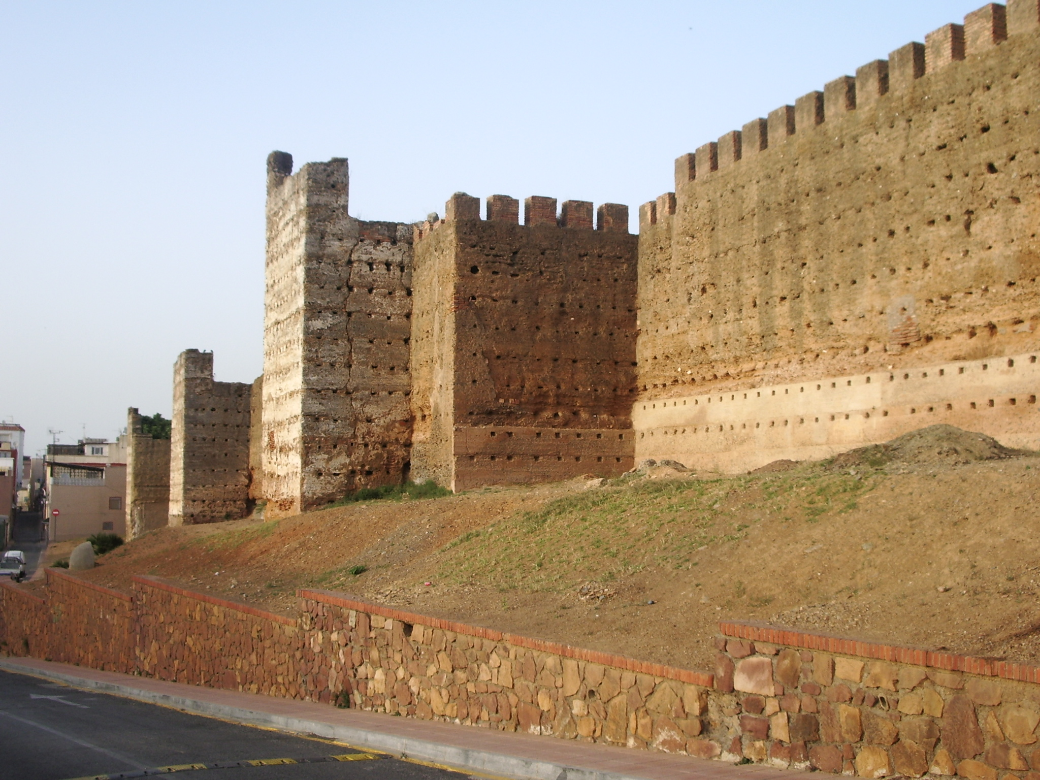 Restos de las murallas meriníes de Ceuta